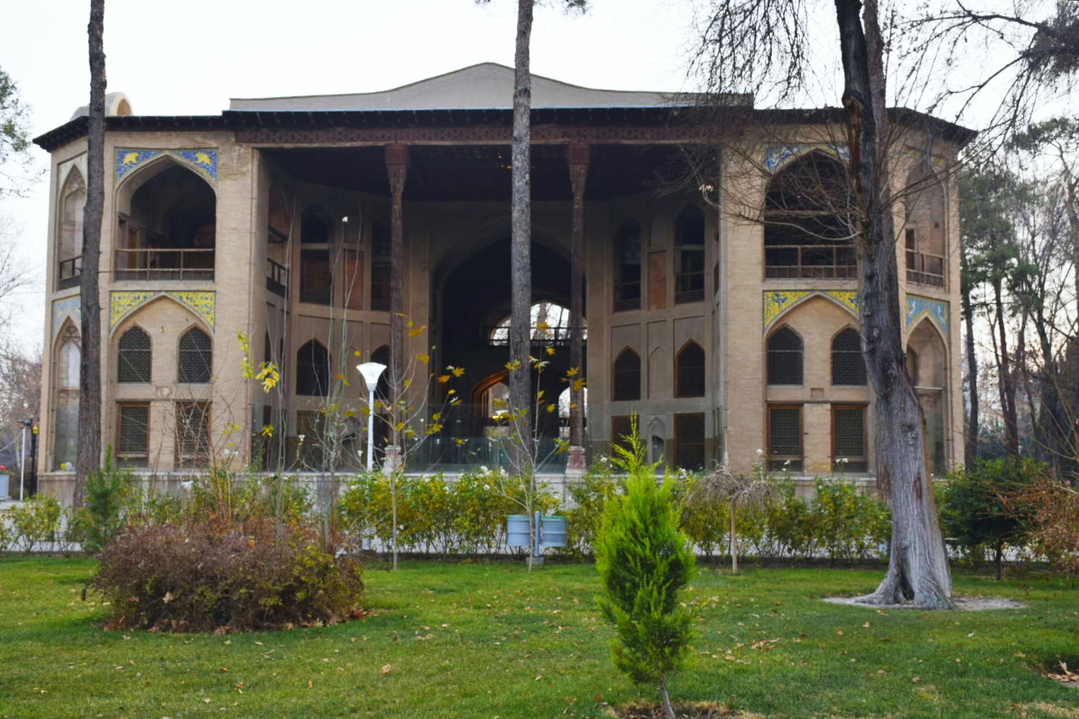 عمارت هشت بهشت